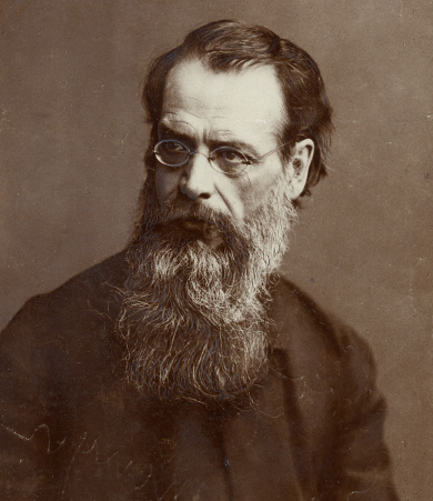 Austrian painter August Eisenmenger (1830-1907)